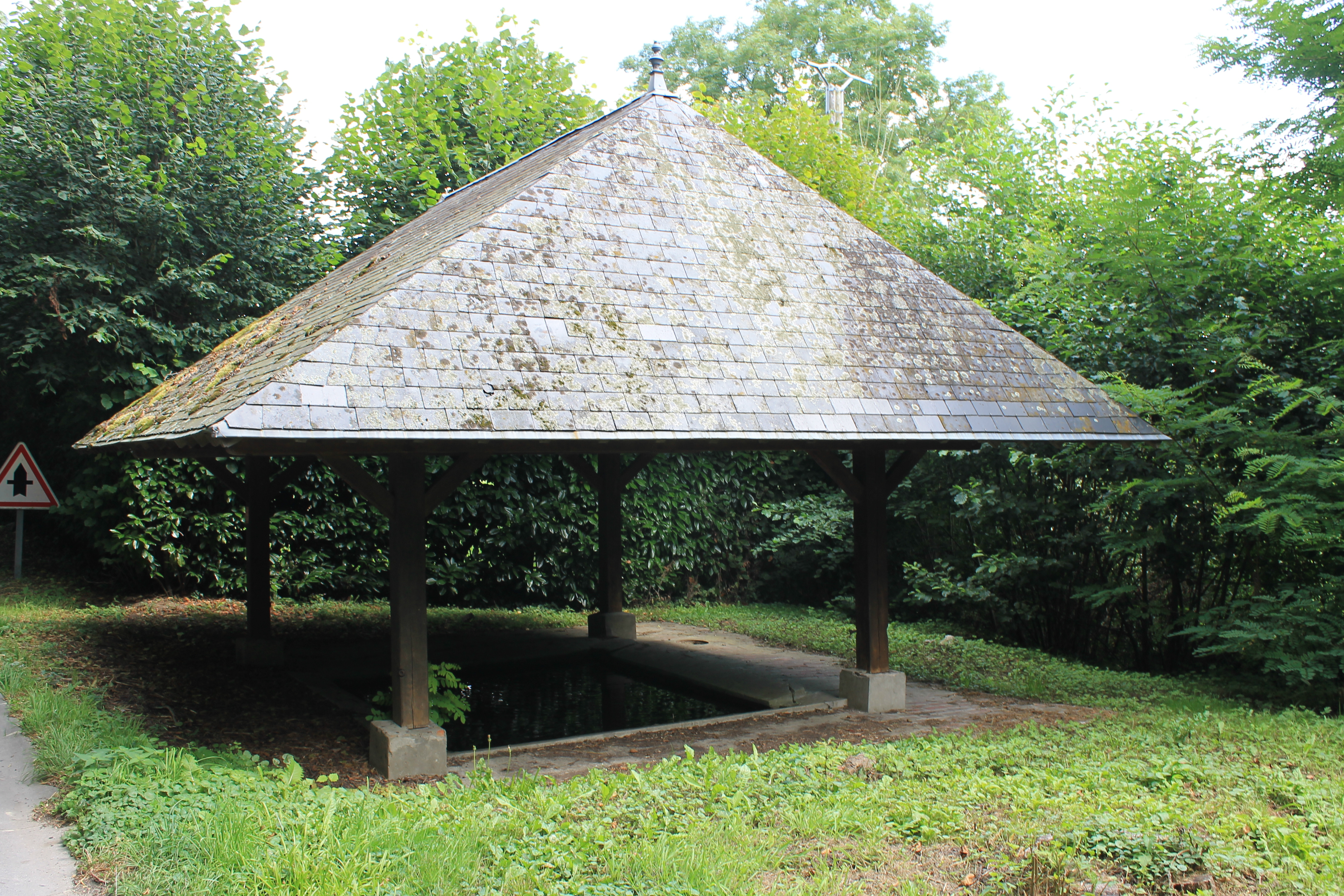 Lavoir de Glanville sur la D 275 (Calvados)